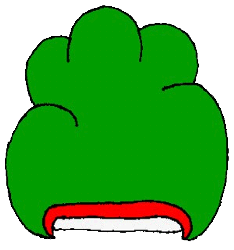 Glifo de Lolotla, Hidalgo